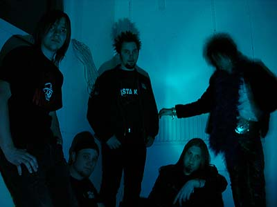 Total apati.